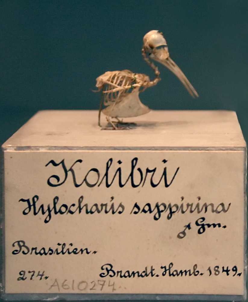 Historisches Ausstellungsstück im Naturhistorischen Museum Stockhom (Kolibri)